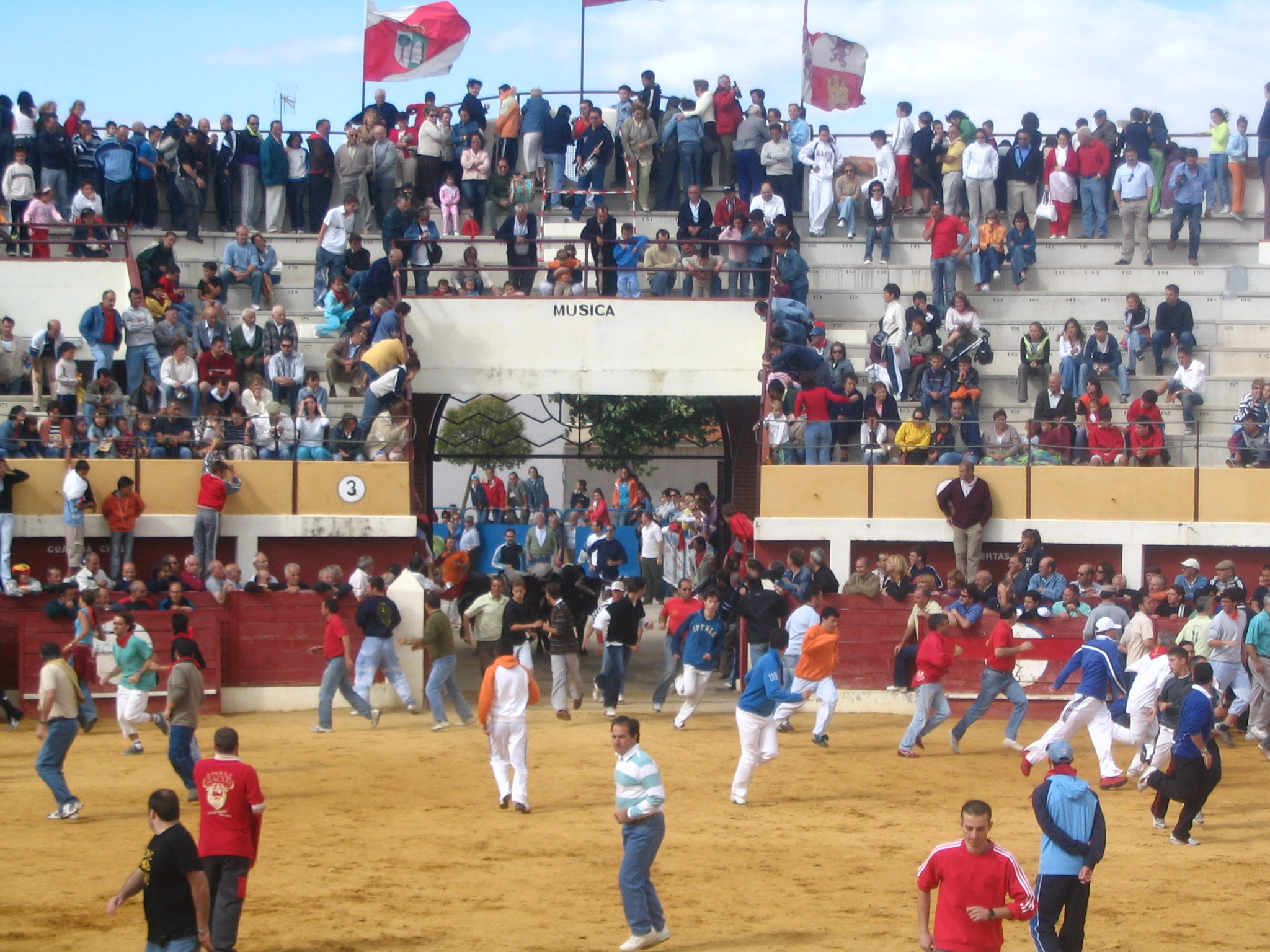 Tradicional encierro, 17/08/2006. Macotera